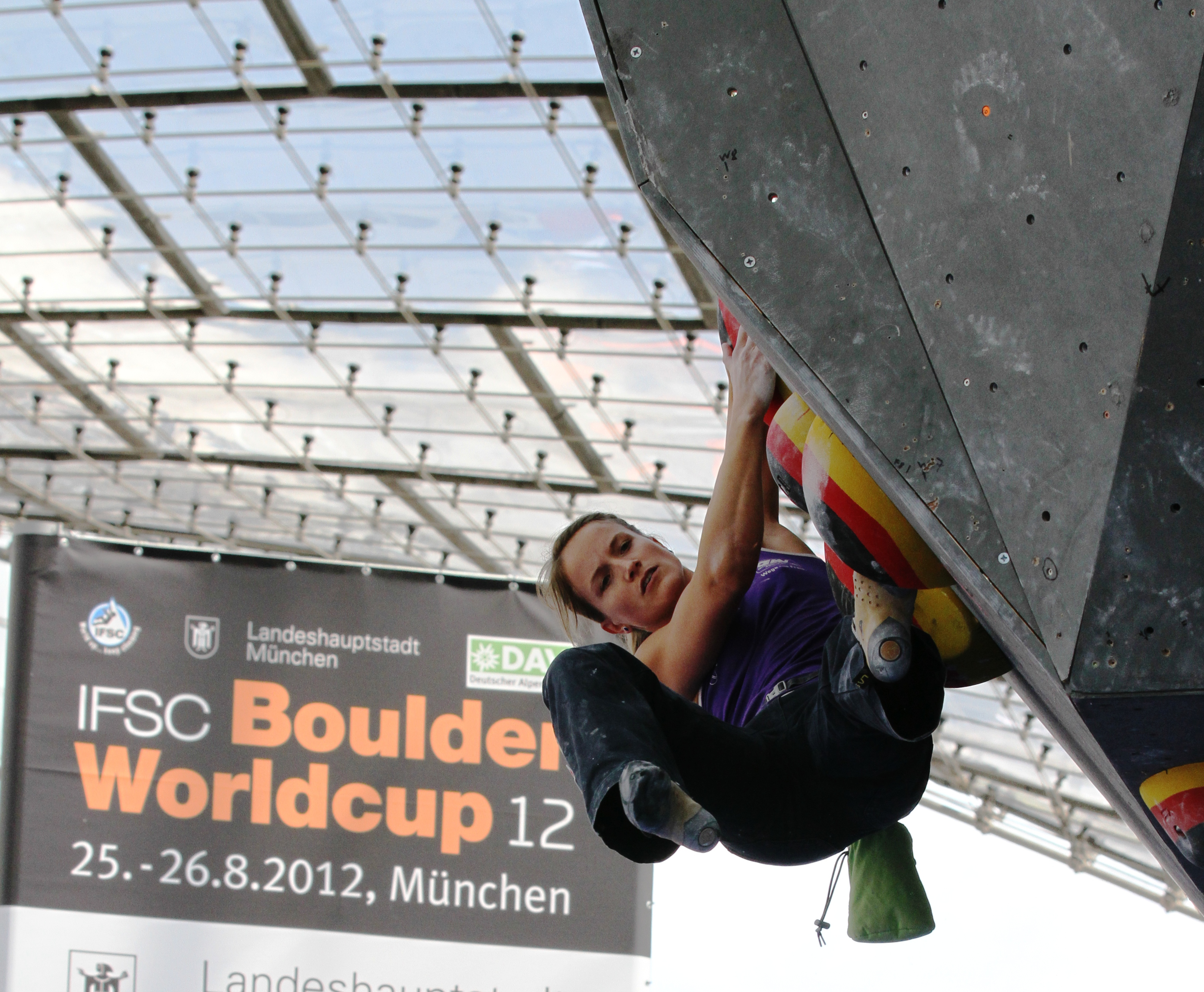 Anna Stoehr, AUS